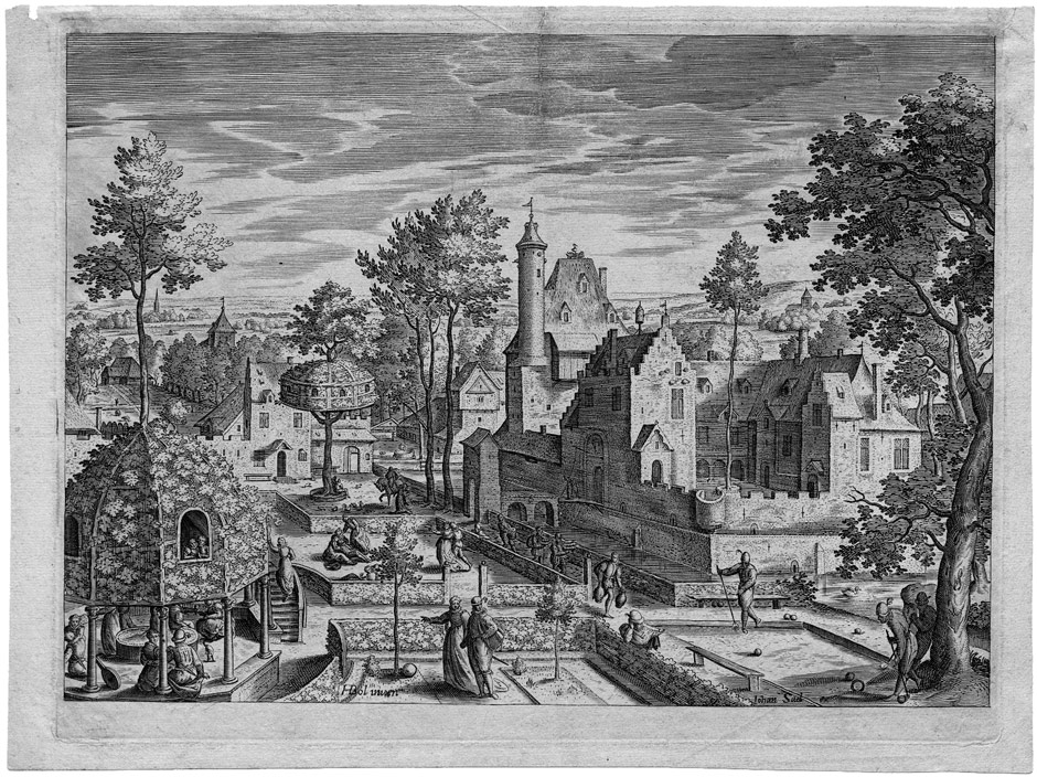 Schloss mit Edelleuten in einem Park